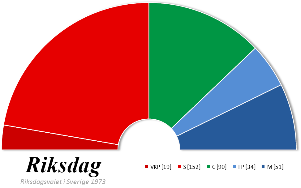 Composition du Riksdag suédois après les élections générales de 1973